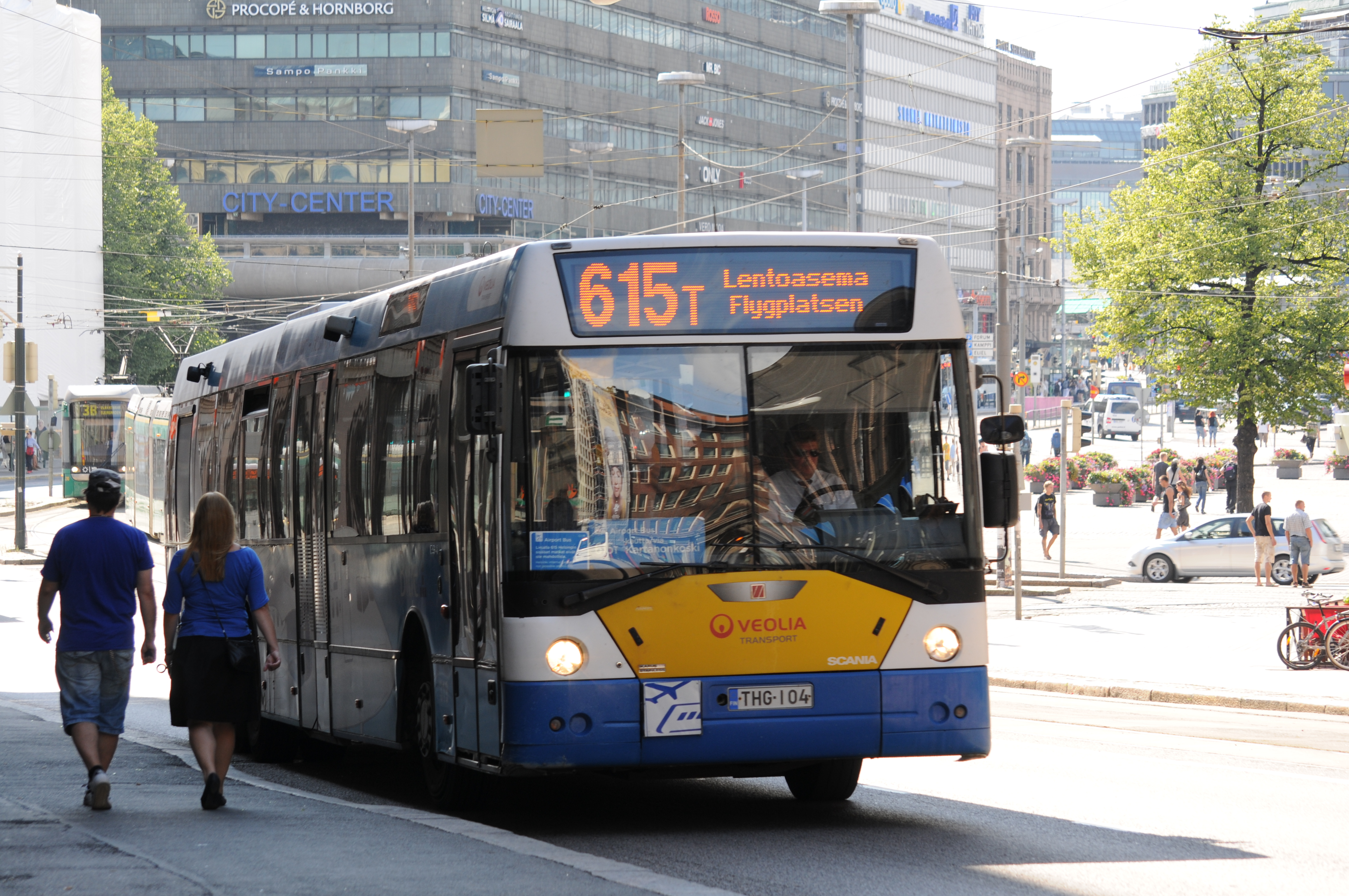 Helsinki